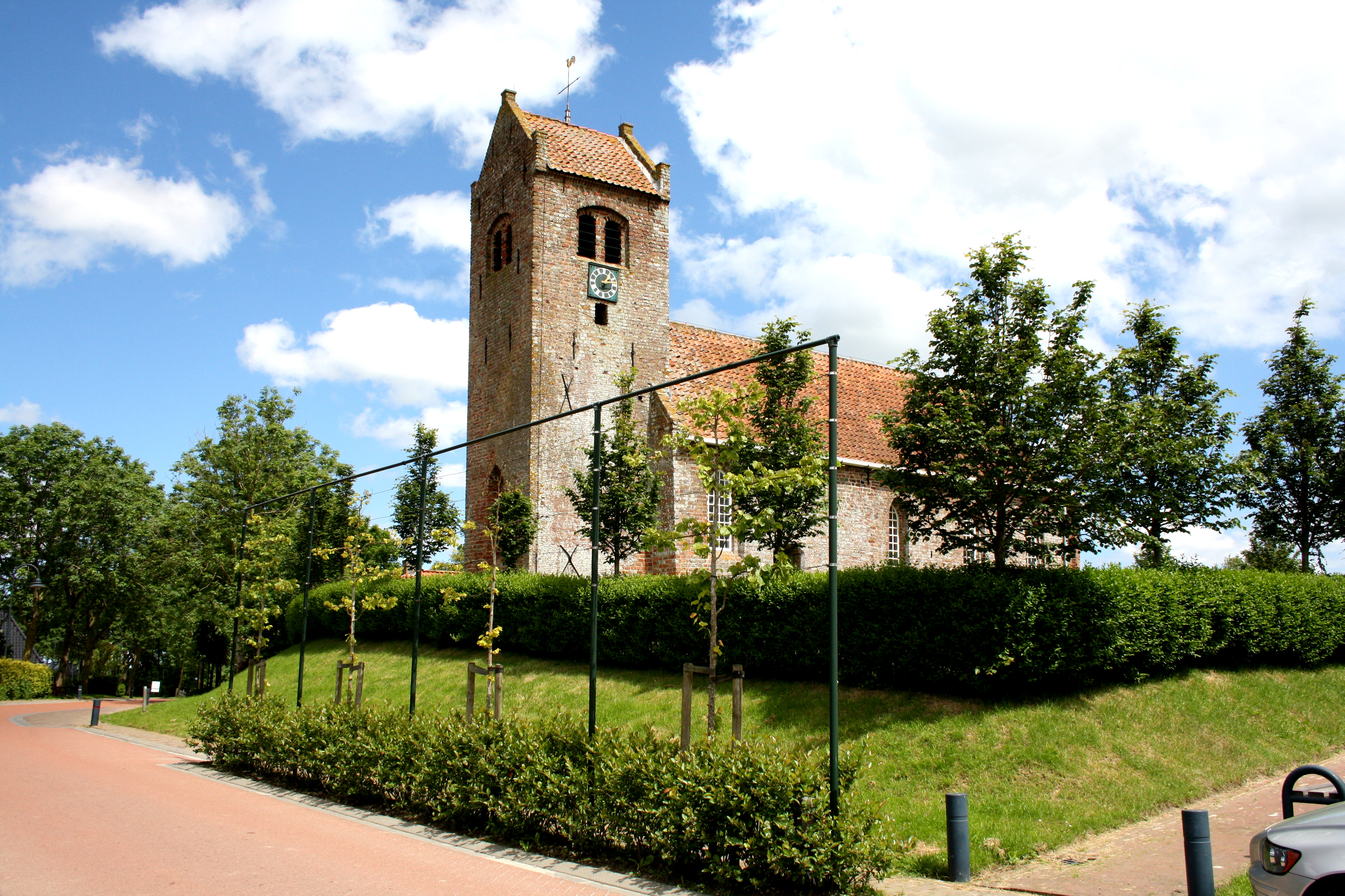 Ginnum - hervormde kerk